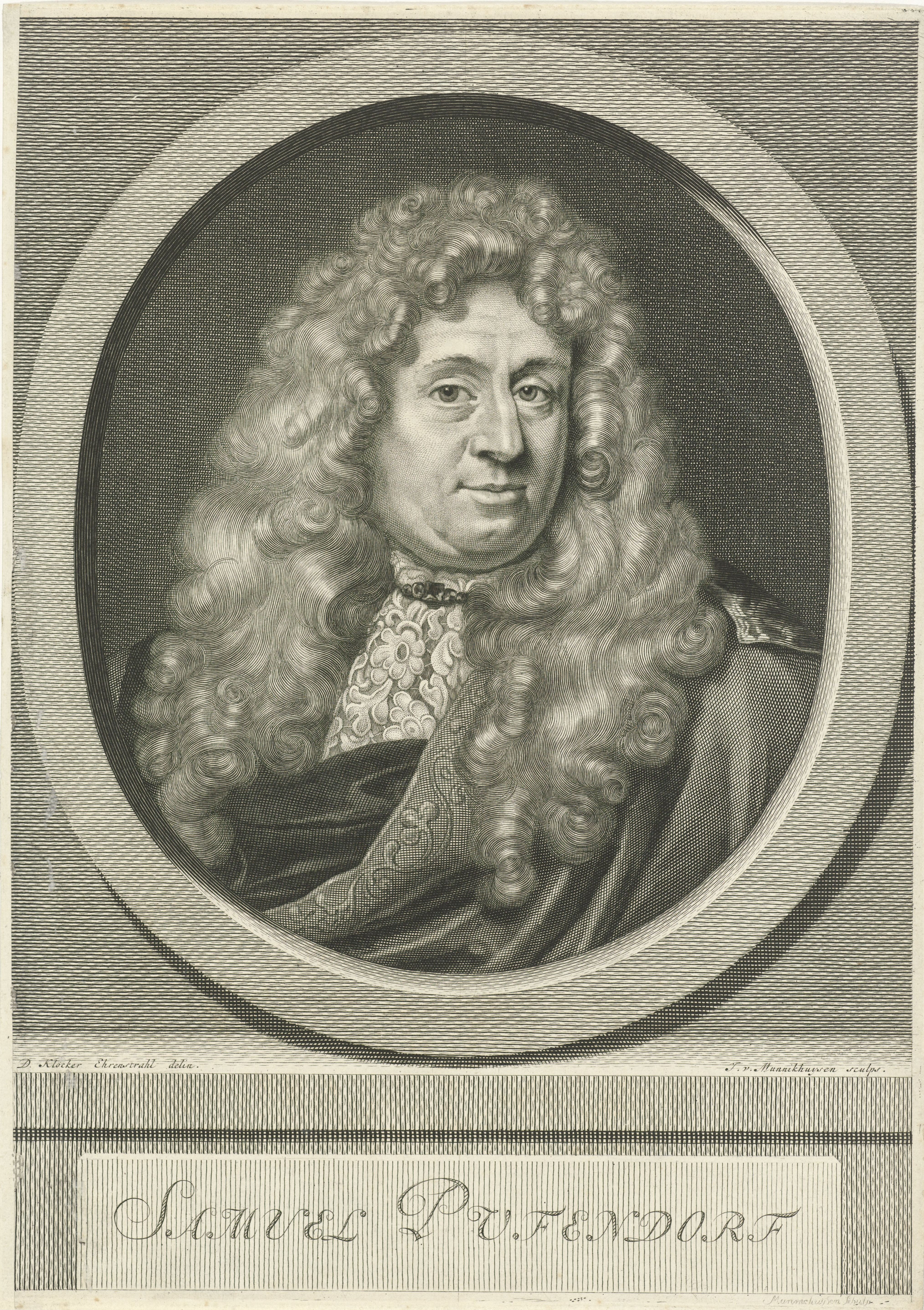 IdentificatieTitel(s): Portret van Samuel von PufendorfObjecttype: prent Objectnummer: RP-P-OB-23.763Catalogusreferentie: Hollstein Dutch 27Opschriften / Merken: verzamelaarsmerk, verso, gestempeld: Lugt 2228Omschrijving: Portret van Samuel von Pufendorf, rechtsfilosoof, politiek denker en historicus.VervaardigingVervaardiger: prentmaker: Johannes Willemsz. Munnickhuysen (vermeld op object)naar tekening van: David Ehrenstrahl (vermeld op object)Plaats vervaardiging: NederlandDatering: 1664 - 1721Fysieke kenmerken: gravureMateriaal: papier Techniek: graveren (drukprocedé)Afmetingen: plaatrand: h 319 mm × b 227 mmOnderwerpWie: Samuel von PufendorfVerwerving en rechtenVerwerving: onbekendCopyright: Publiek domein